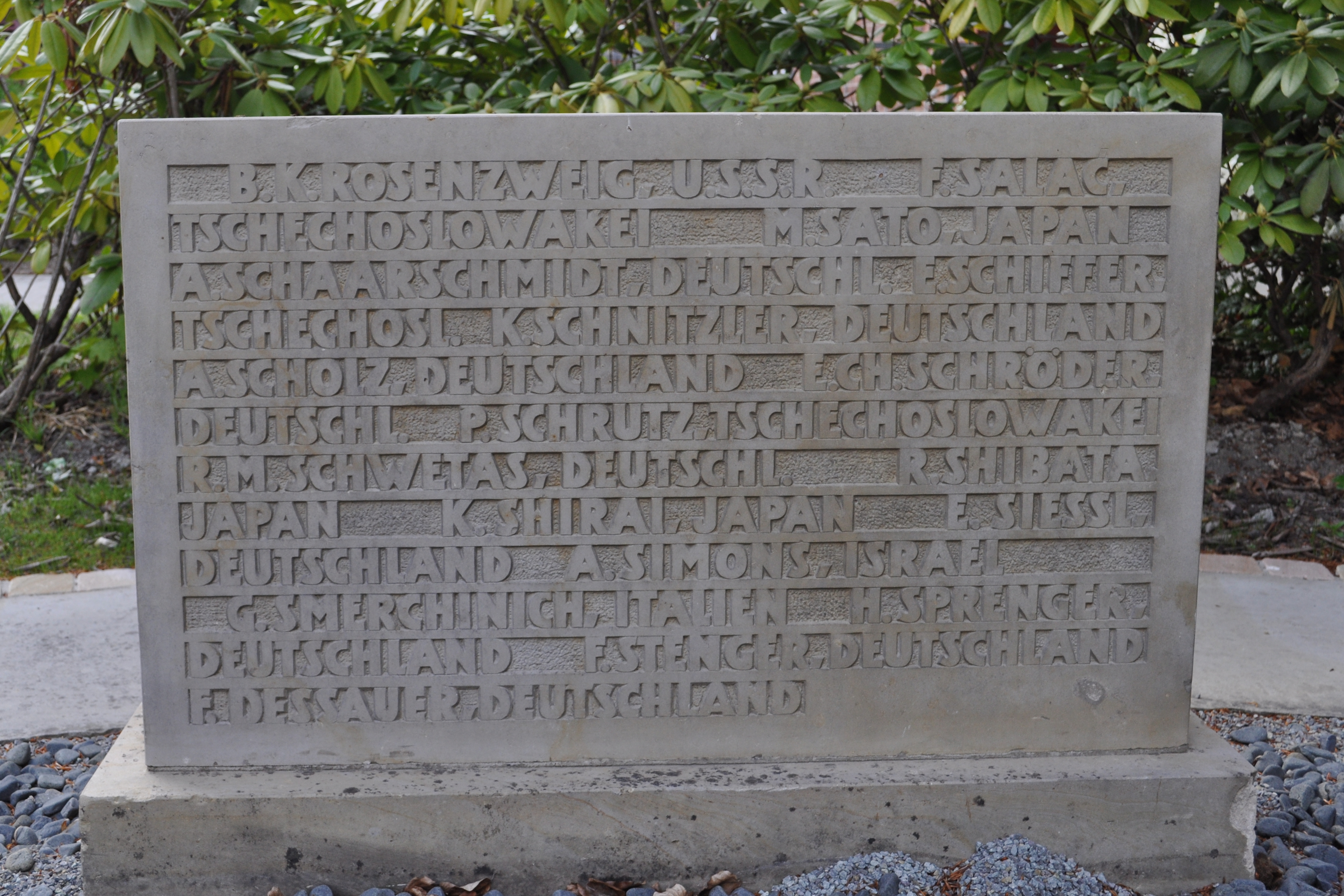 Ehrenmal der Radiologie auf dem Gelände des Krankenhauses St. Georg in Hamburg. Vorderseite der linken Tafel.